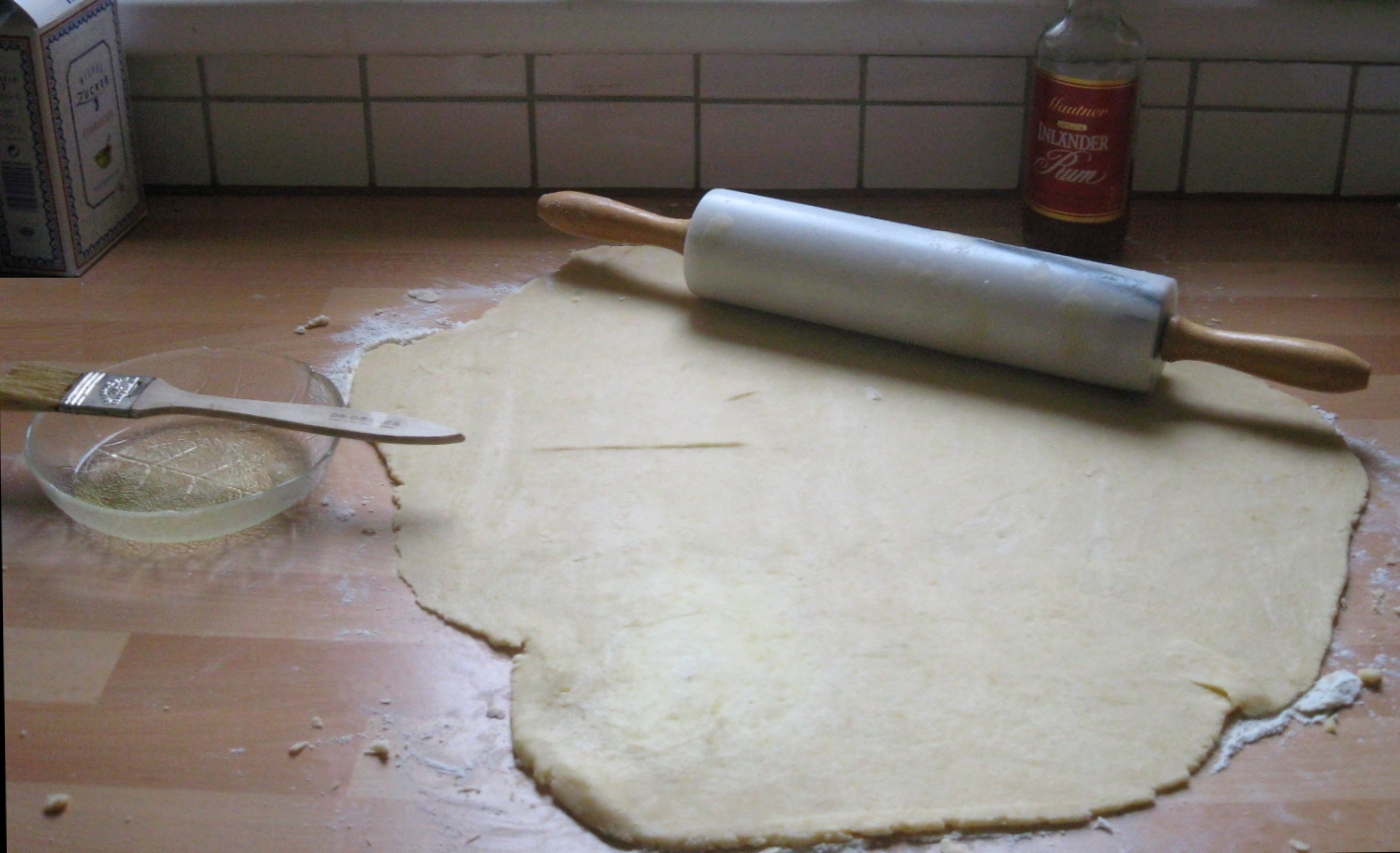 Teig, (Mürbteig), ausgerollt